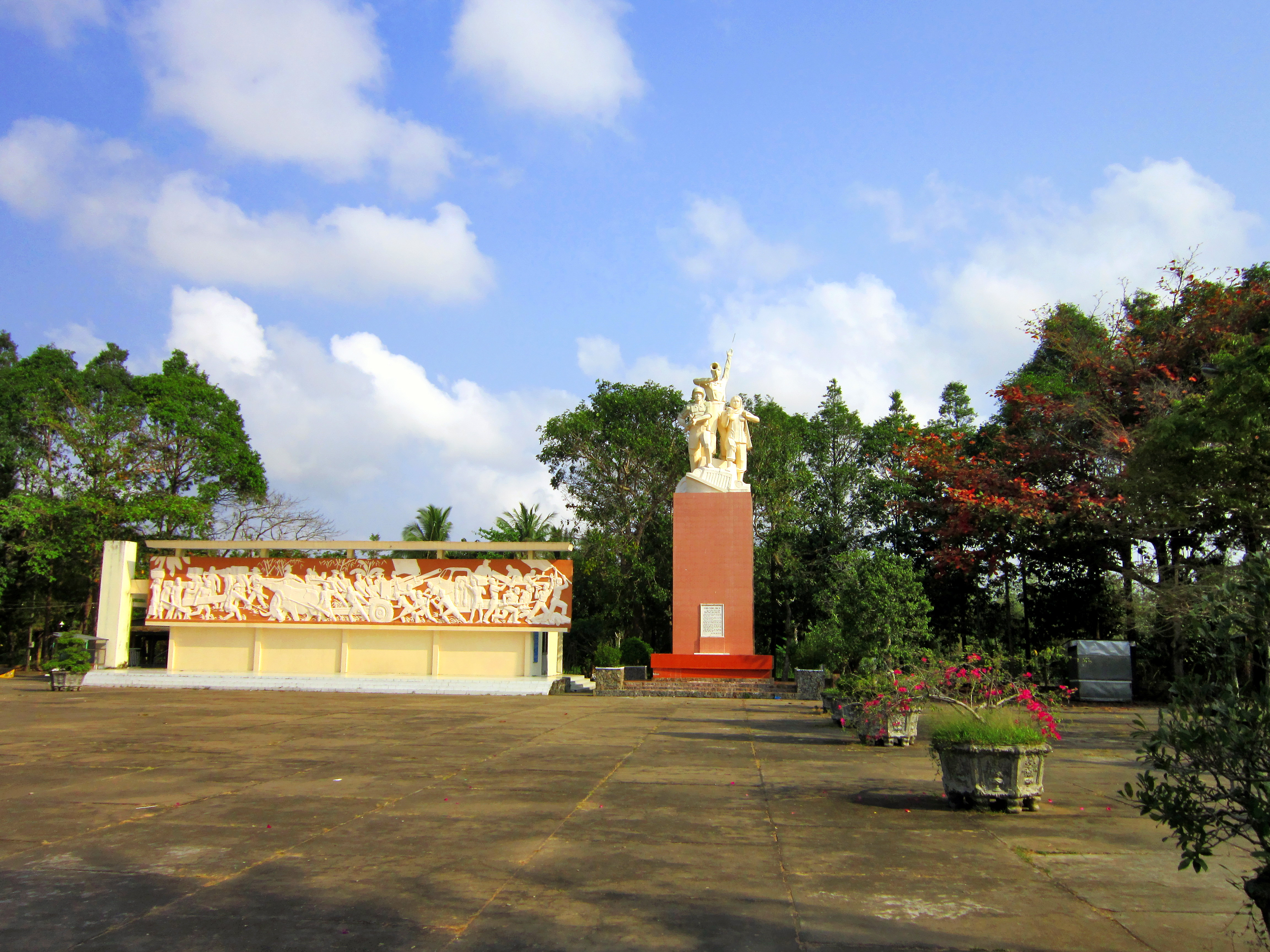 Tượng đài trong Khu di tích Chiến thắng Tầm Vu ở xã Thạnh Xuân, huyện Châu Thành A, tỉnh Hậu Giang, Việt Nam.